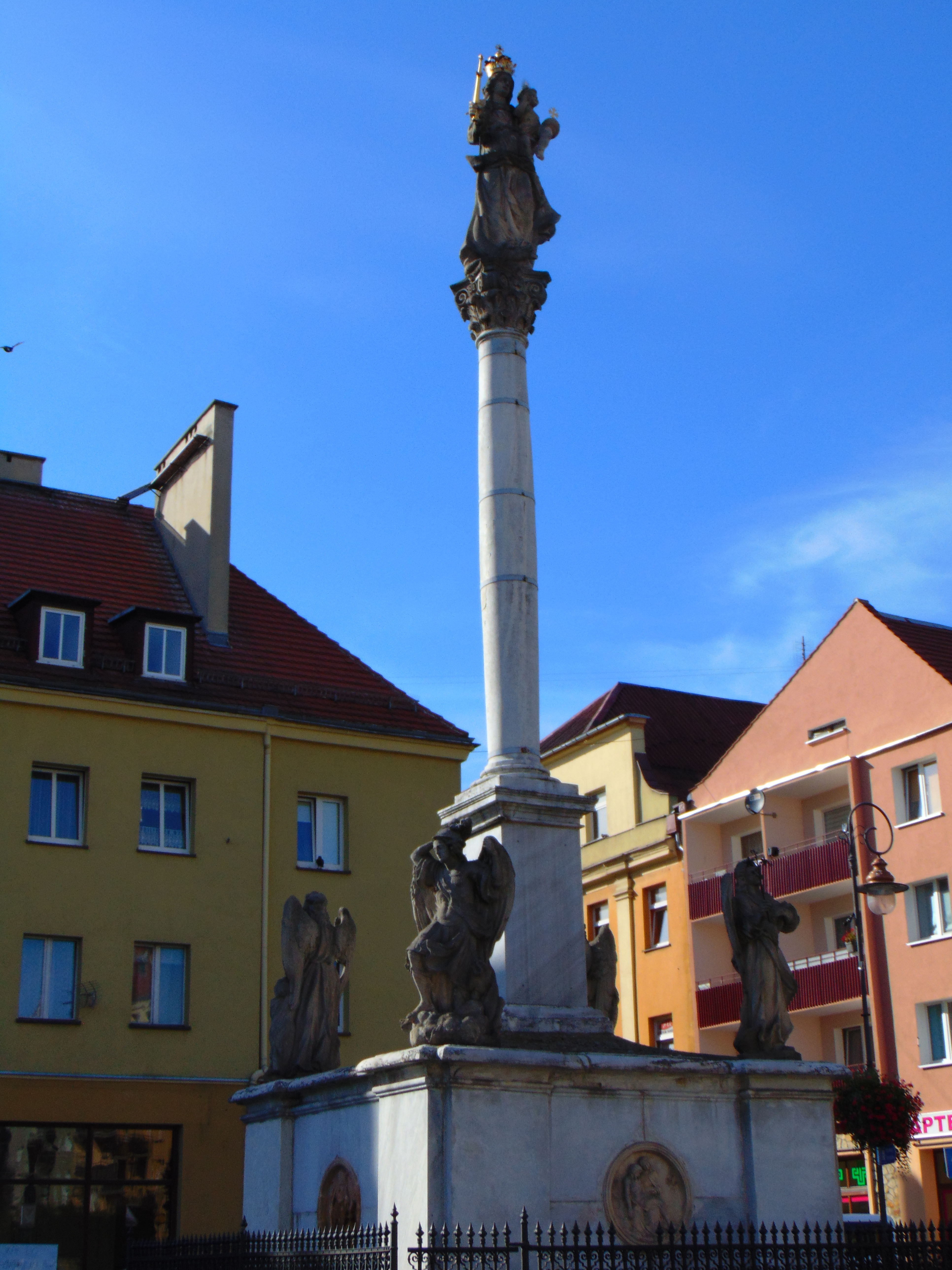 Kolumna Maryjna